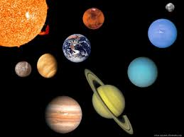 planetologia del sistema solar